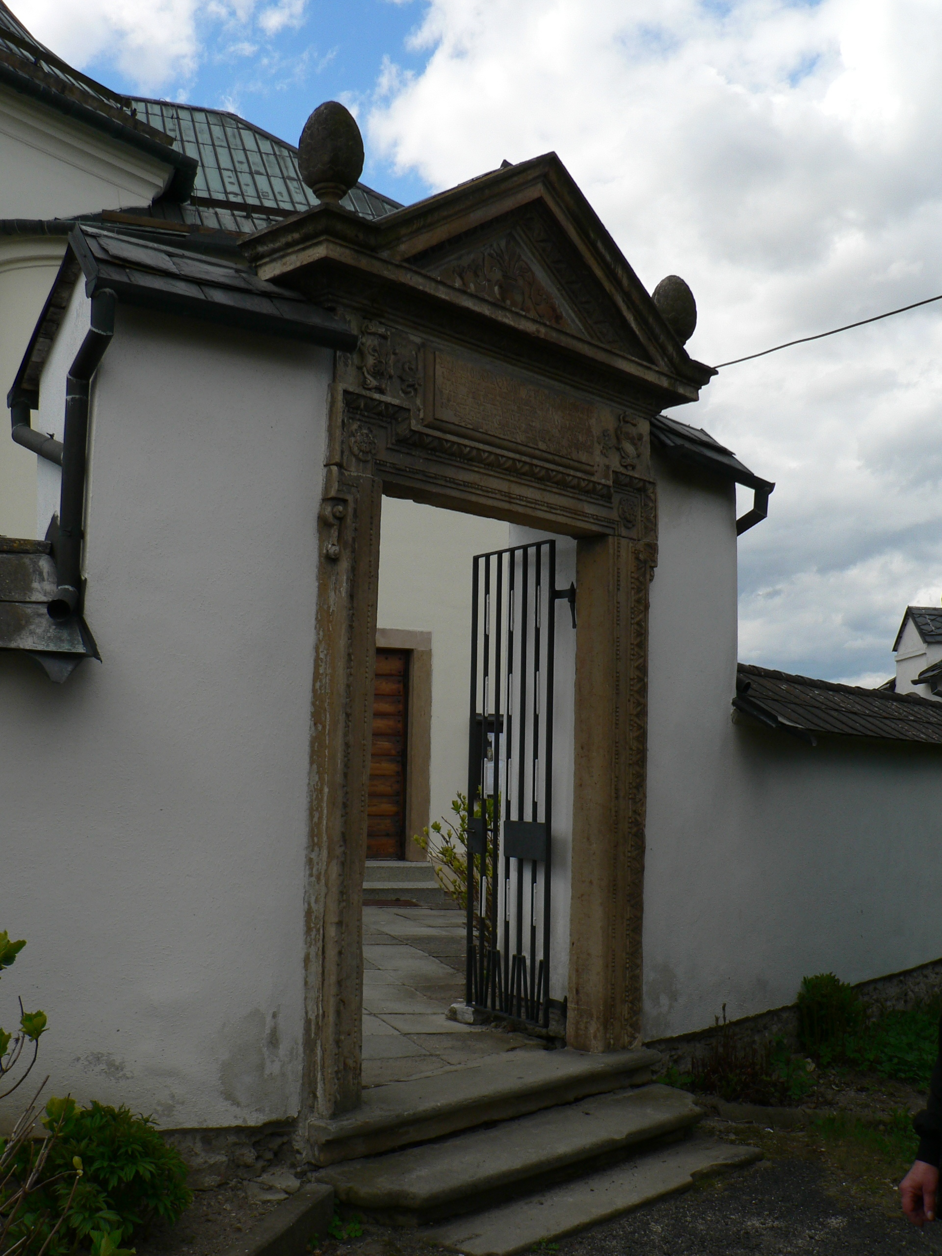 Kostel svatého Martina (Měrotín) - vstupní branka do areálu.